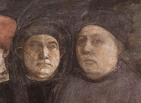 Rielaborazione grafica personale su un particolare di affresco del duomo di Prato. Autoritratti di Fra Diamante e Filippo Lippi